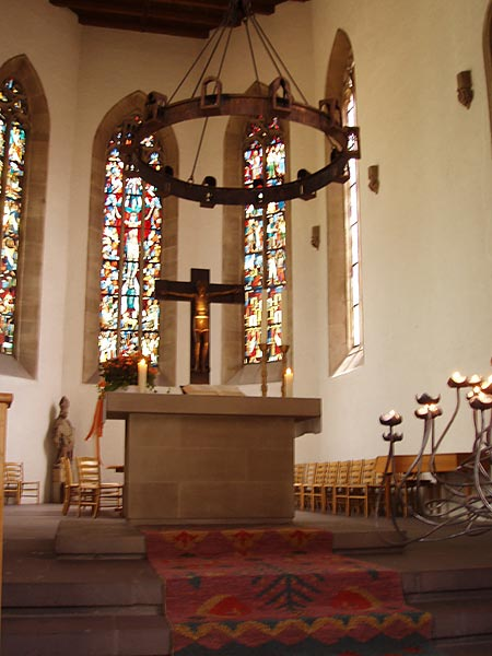 Altar und Chor der Nikolaikirche in Heilbronn